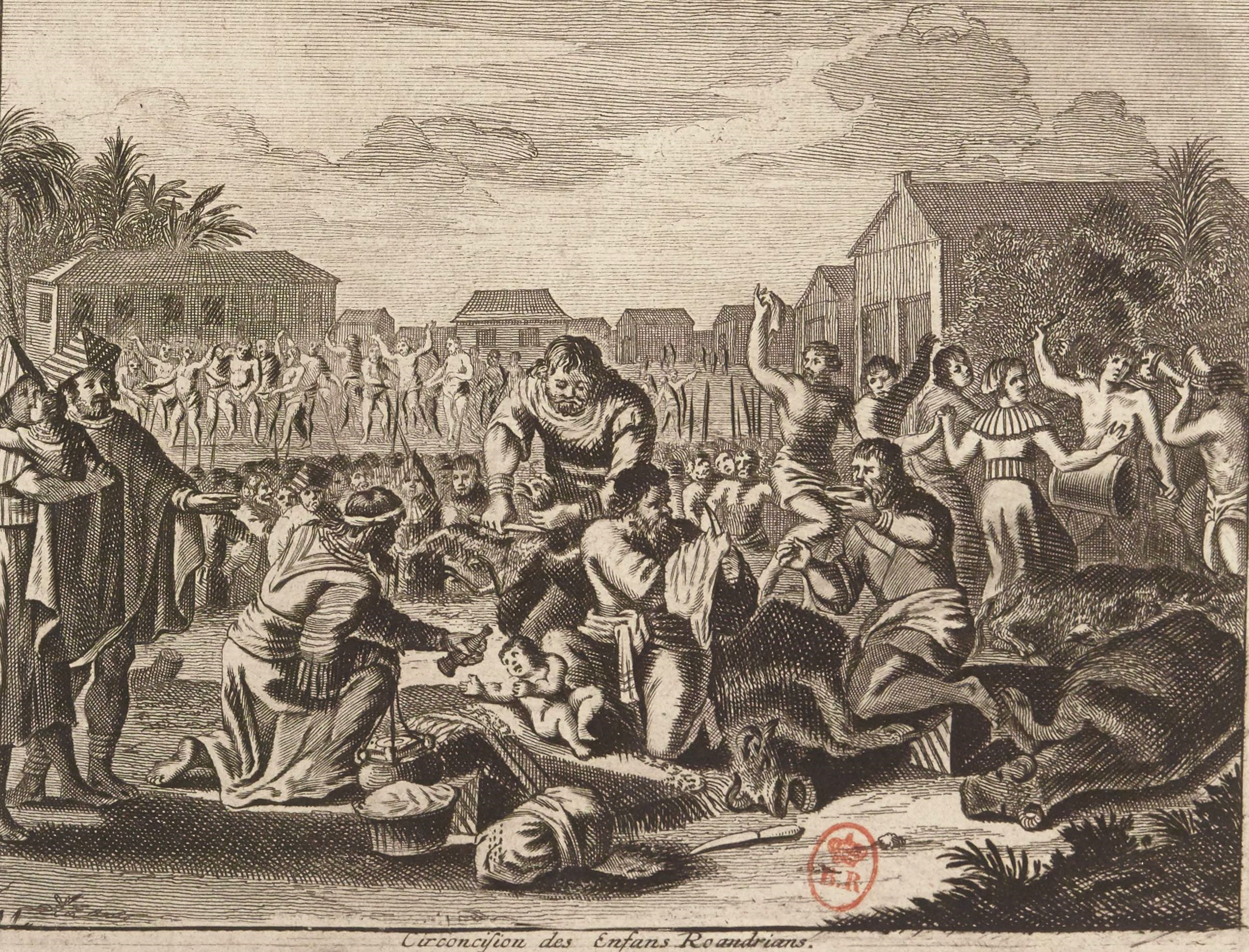 La circoncision à Madagascar est un rituel intiatique traditionnel, prenant différentes formes selon les régions, par lequel le jeune garçon est pleinement intégré à la société. Titre complet de l'oeuvre où est extraite l'estampe : La galerie agréable du monde, où l'on voit en un grand nombre de cartes très exactes et de belles tailles douces les principaux empires, roïaumes, républiques, provinces, villes, bourgs et forteresses ...les îles, côtes rivières, ports de mer...les antiquitez, les abbayes, églises, académies...comme aussi les maisons de campagne, les habillemens et moeurs des peuples...dans les quatre parties de l'univers. Divisée en LXVI tomes, les estampes aiant été dessinées sur les lieux et gravées exactement par les célèbres Luyken, Mulder, Goerée, Baptist, Stopendaal et par d'autres maîtres renomez.... Tome troisième d'Afrique / Pieter vander AA